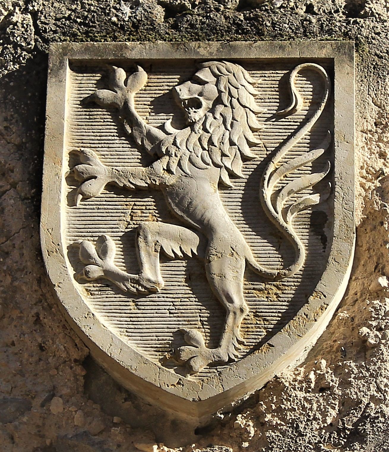 Castello di Avio-Sabbionara in provincia di Trento